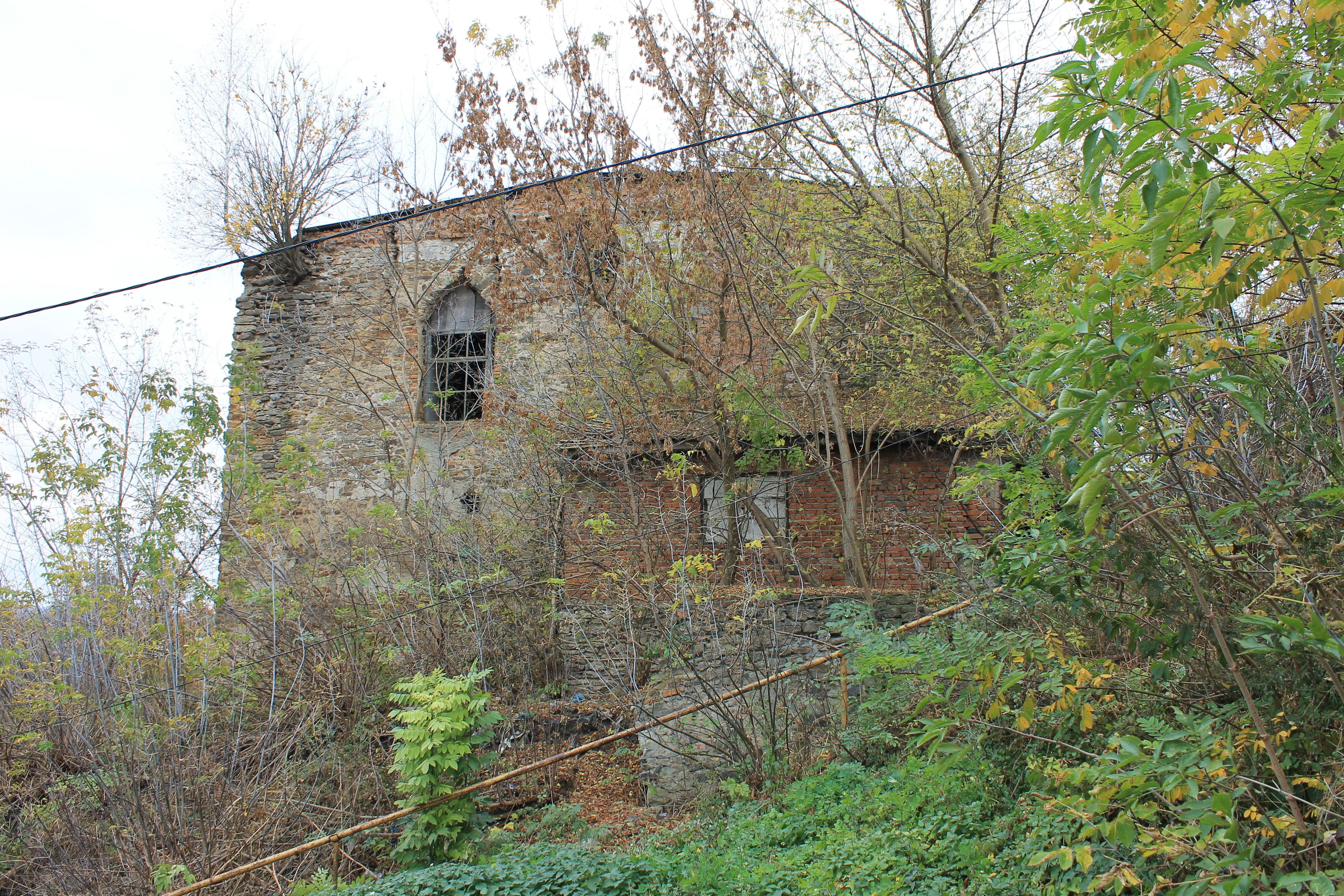 Синагога XVI ст., вул. Заславська, 20, м.Ізяслав, Хмельницька обл.